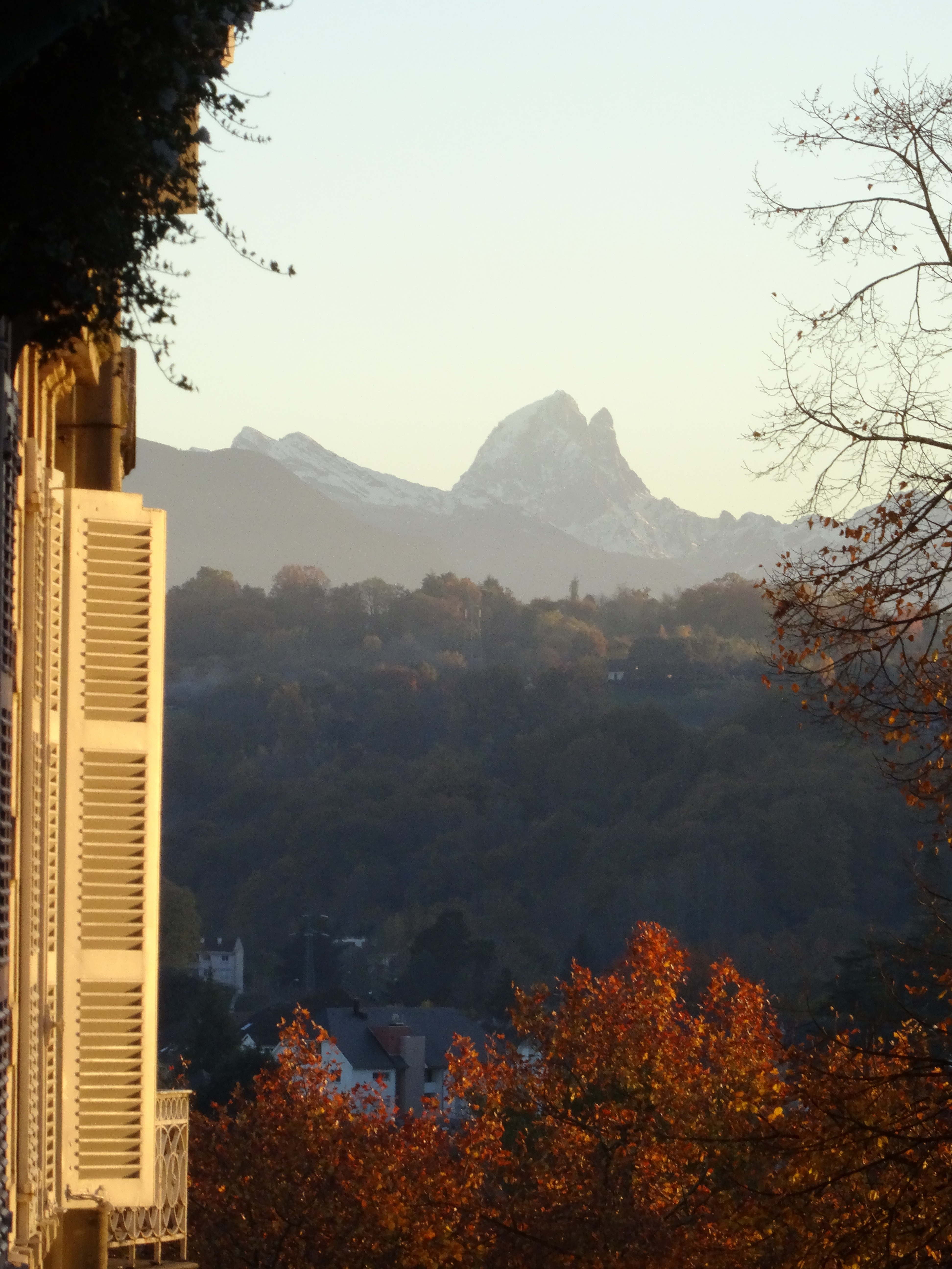 L'Ossau devant une fenêtre à Pau